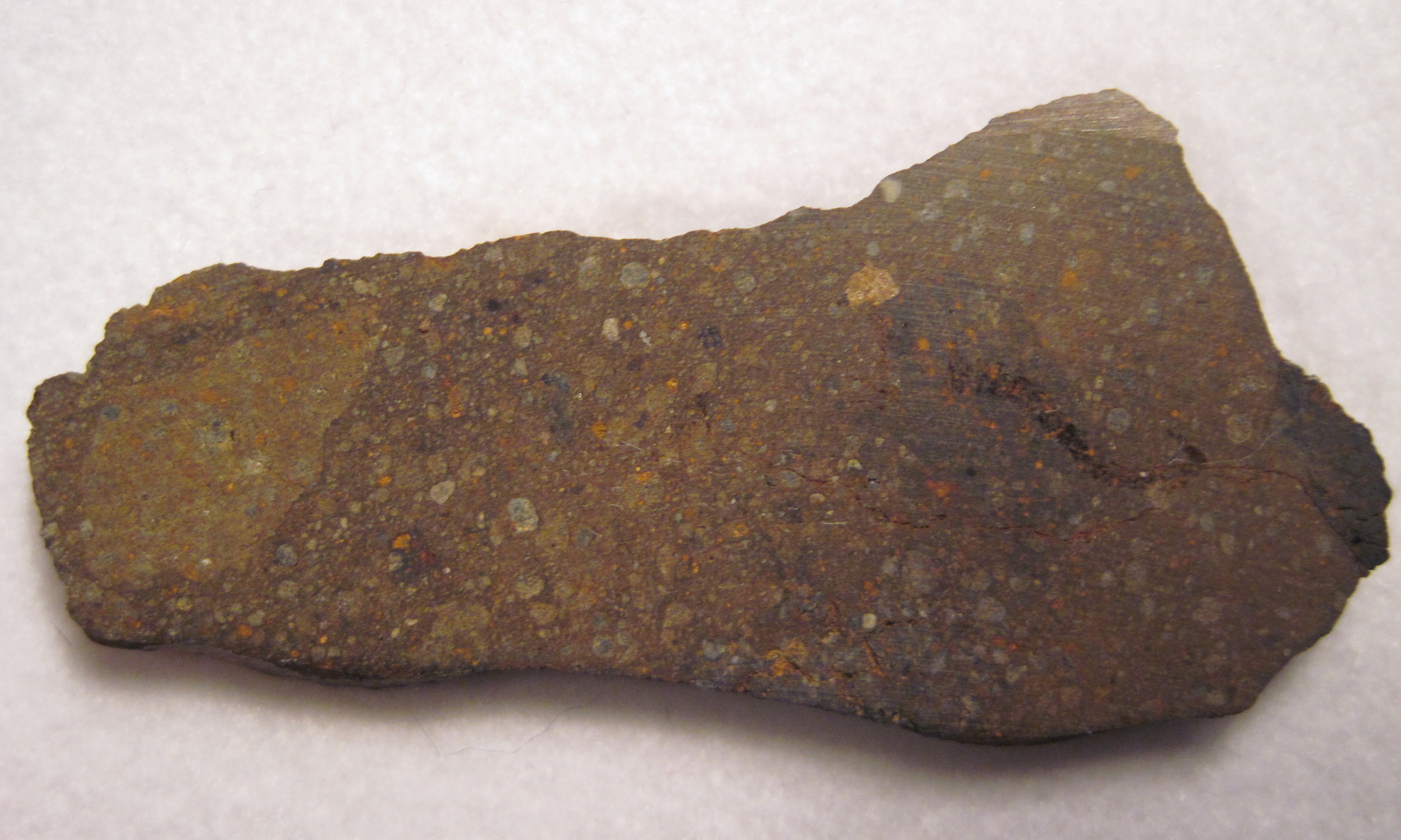 NWA 6394 R3.9 Rumurutiite